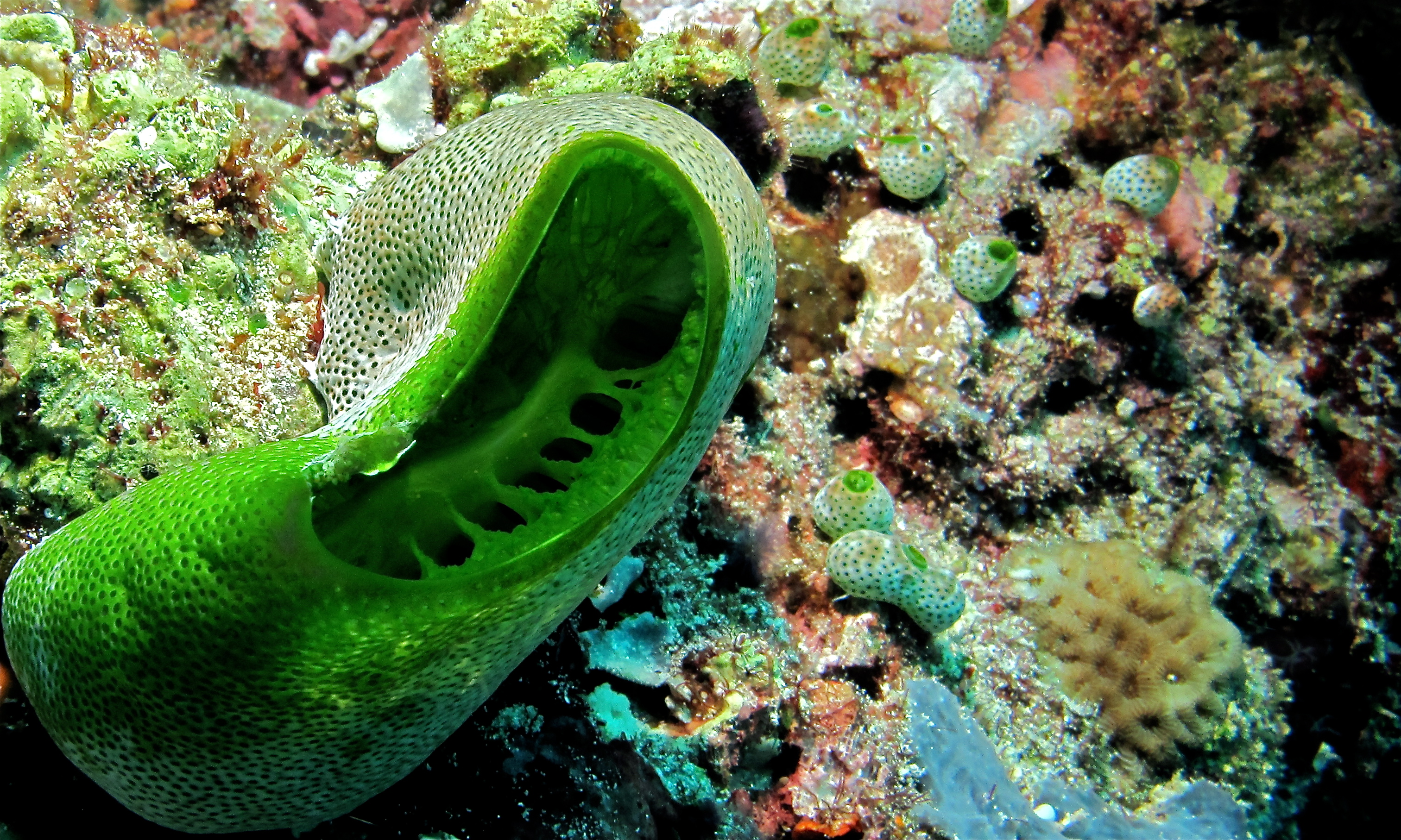 Timur I, Bunaken Island, Sulawesi, INDONESIA